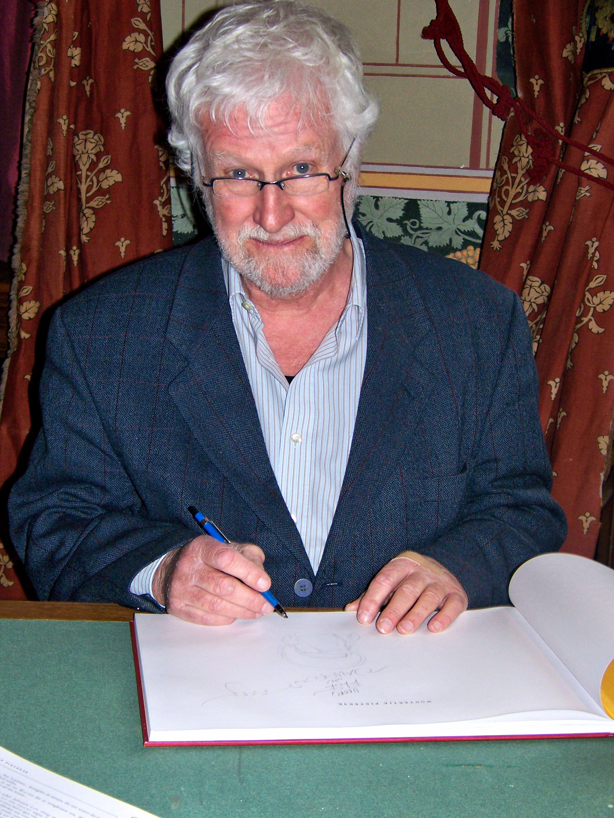 Jan Kruis signeert in het Drents Museum